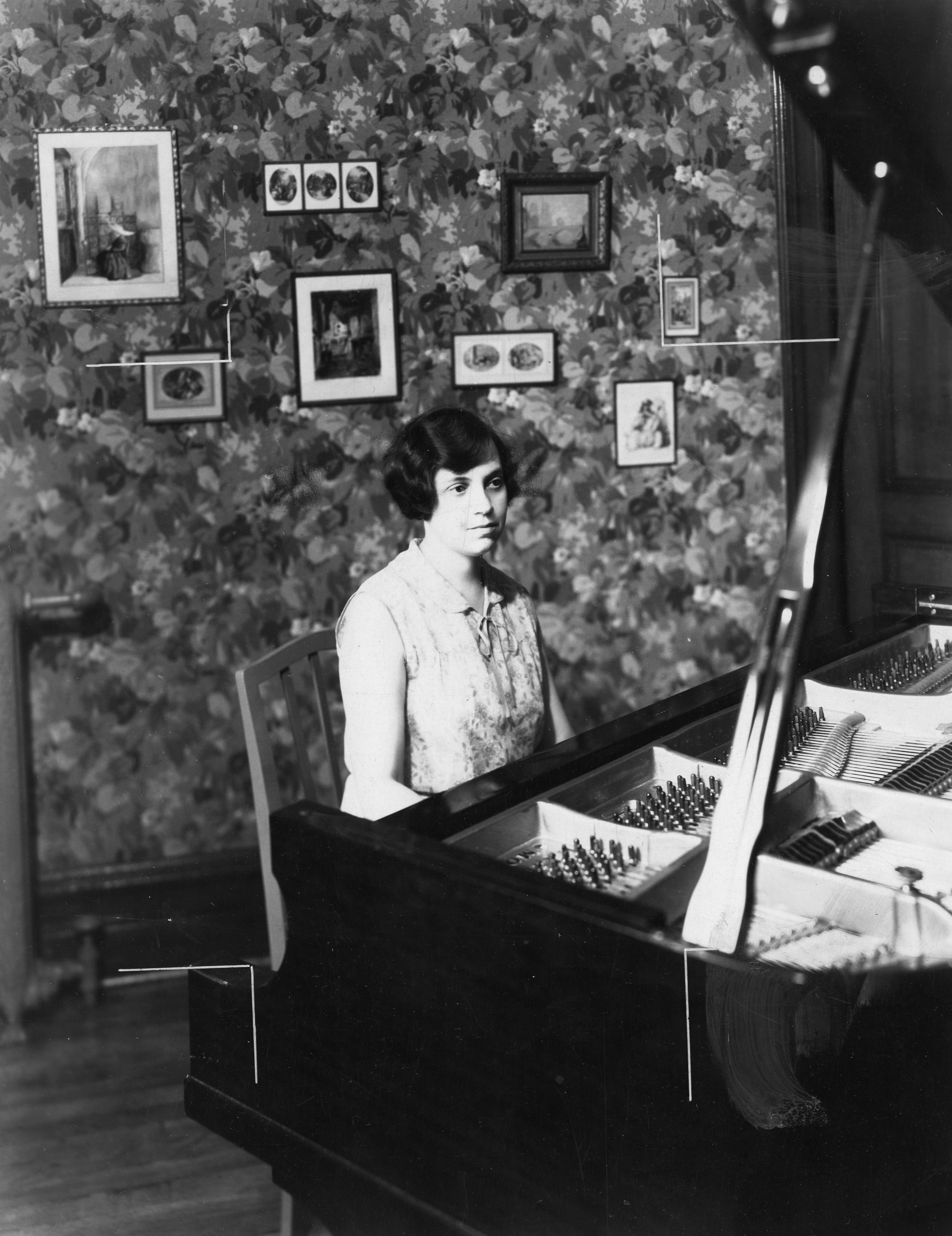 Yvonne Hubert. Portrait au piano